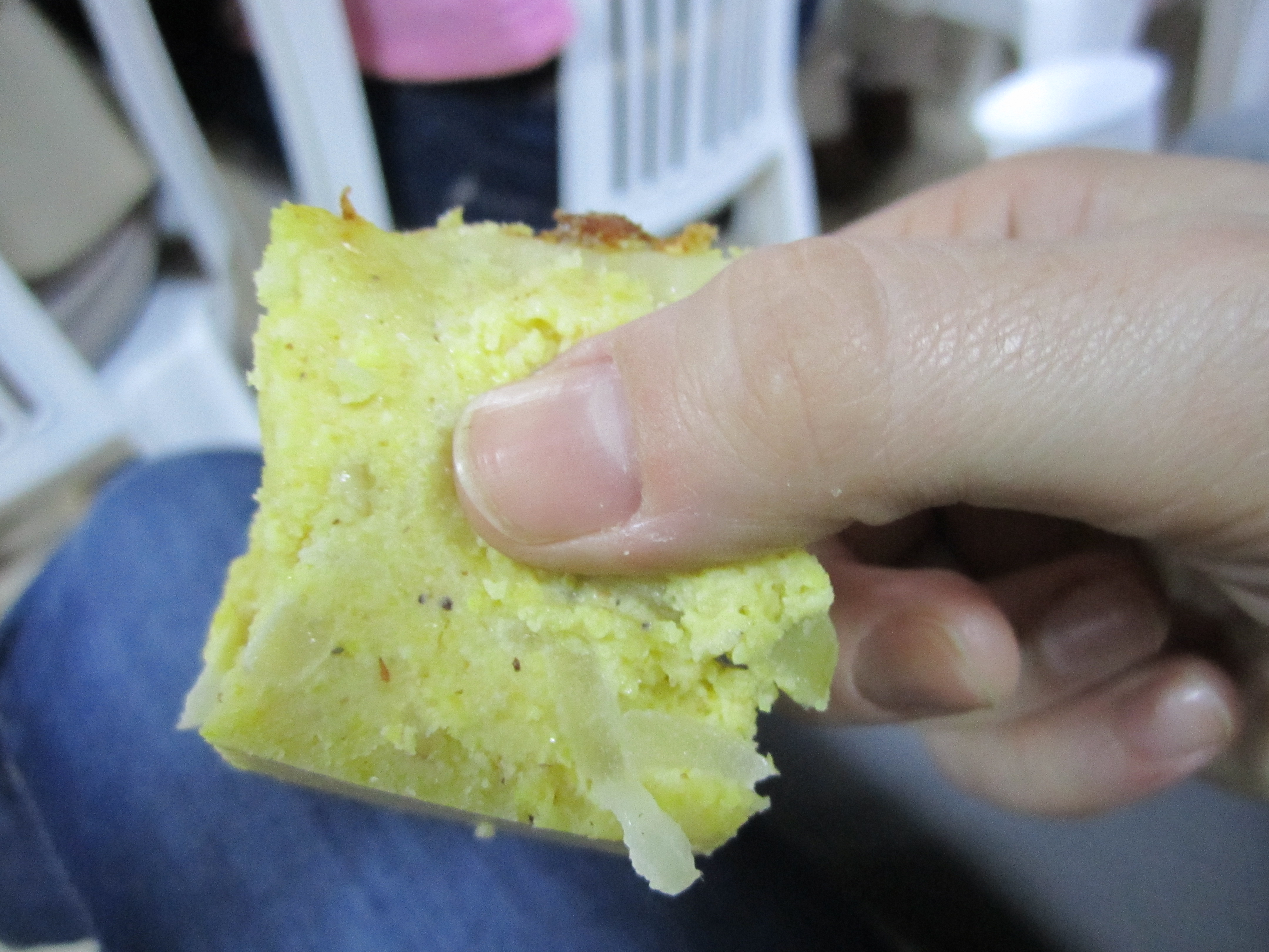 Национальное парагвайское блюдо. Парагвайский суп.